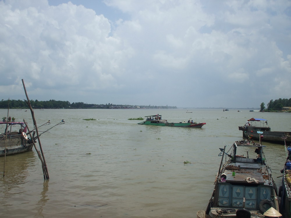 Một đoạn sông Vàm Nao, thuộc huyện Chợ Mới, An Giang, Việt Nam.